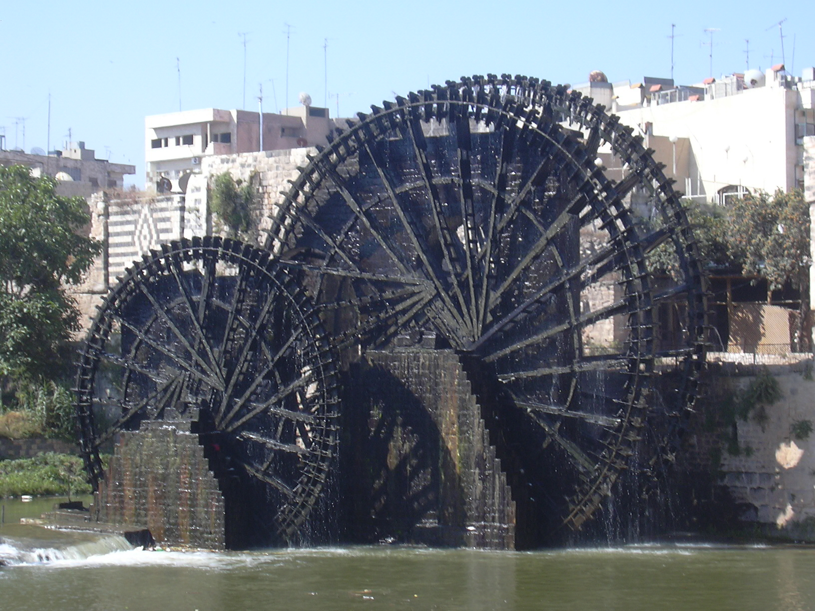 Hama, Norias (hölzerne Schöpfräder) schaufeln quietschend das Wasser aus dem Orontes in die Aquädukte